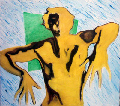 Rapper Olieverf op linnen 100x100cm Toon Diepstraten 2003